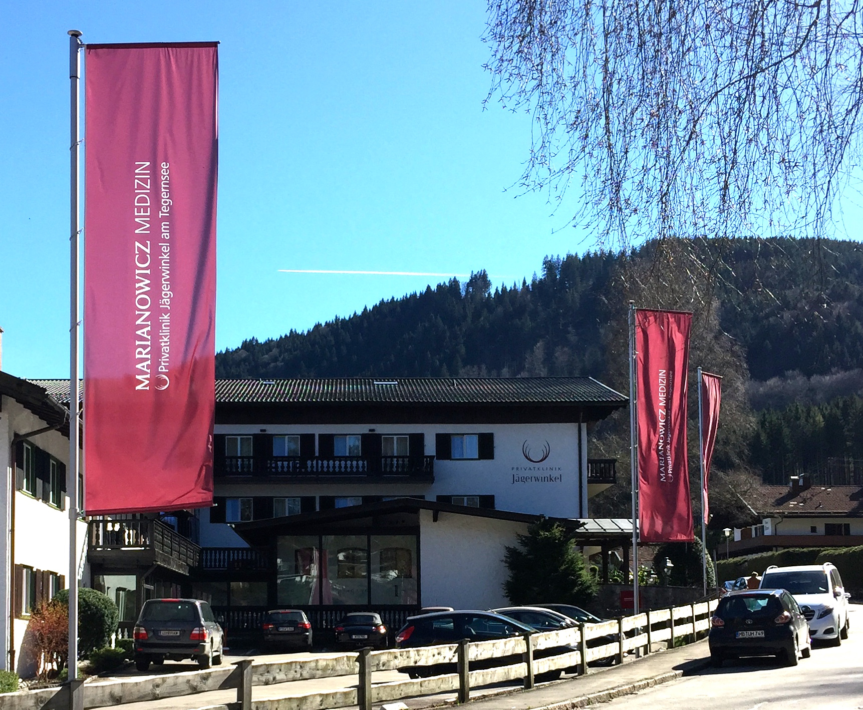 Der Jägerwinkel, gegründet von Trudel Hardieck.